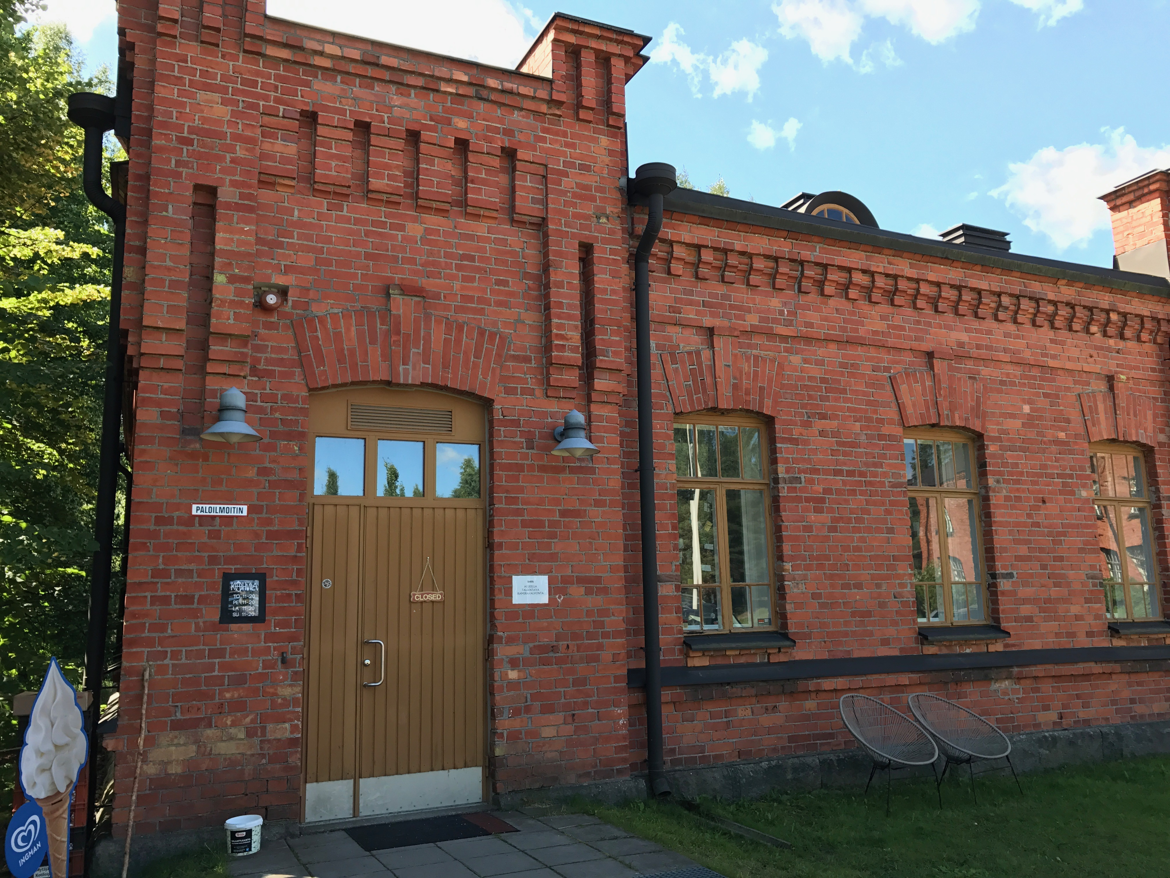 Suomen sotilasmusiikkimuseo Lahdessa.